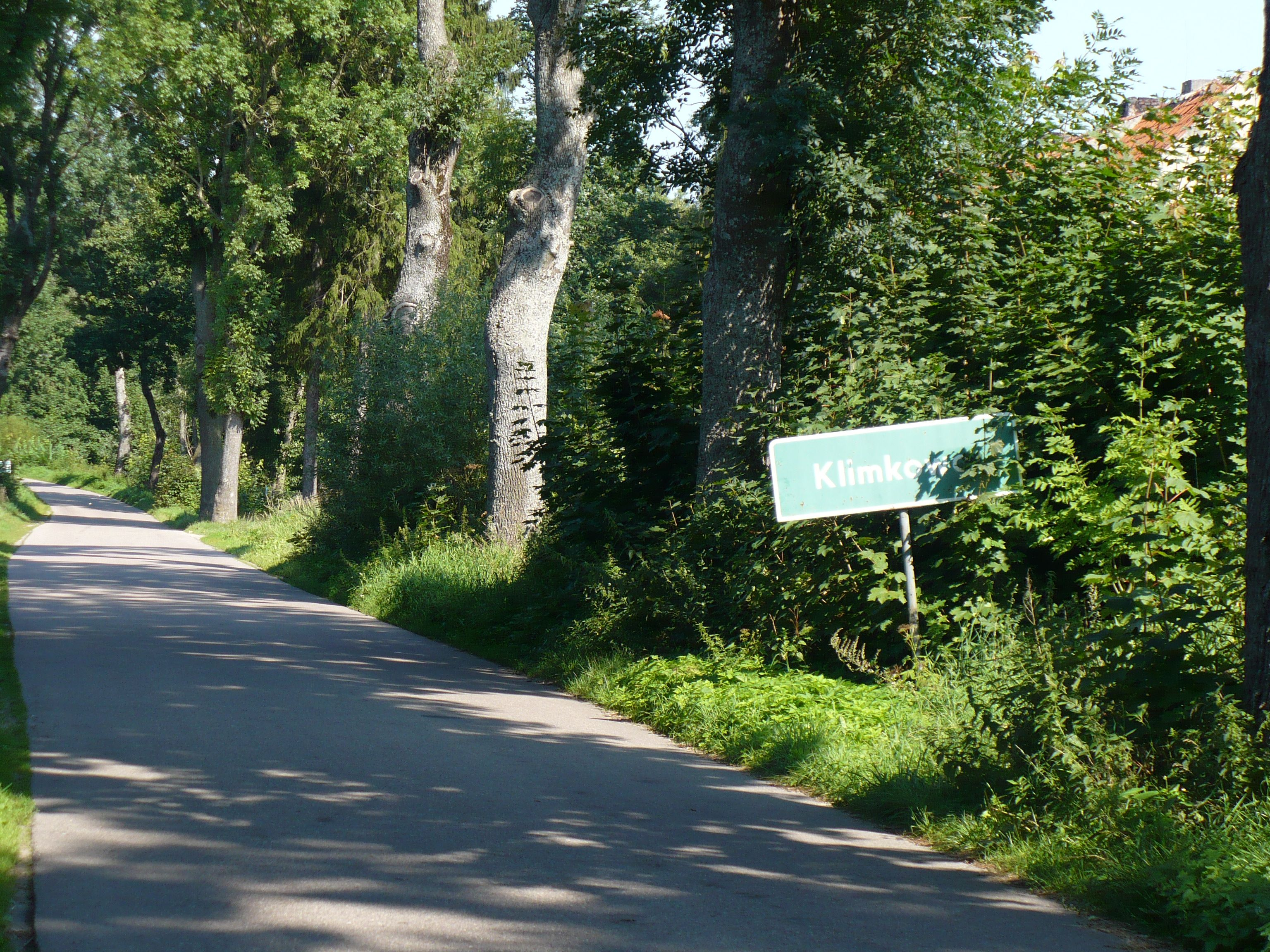 Wieś Klimkowo